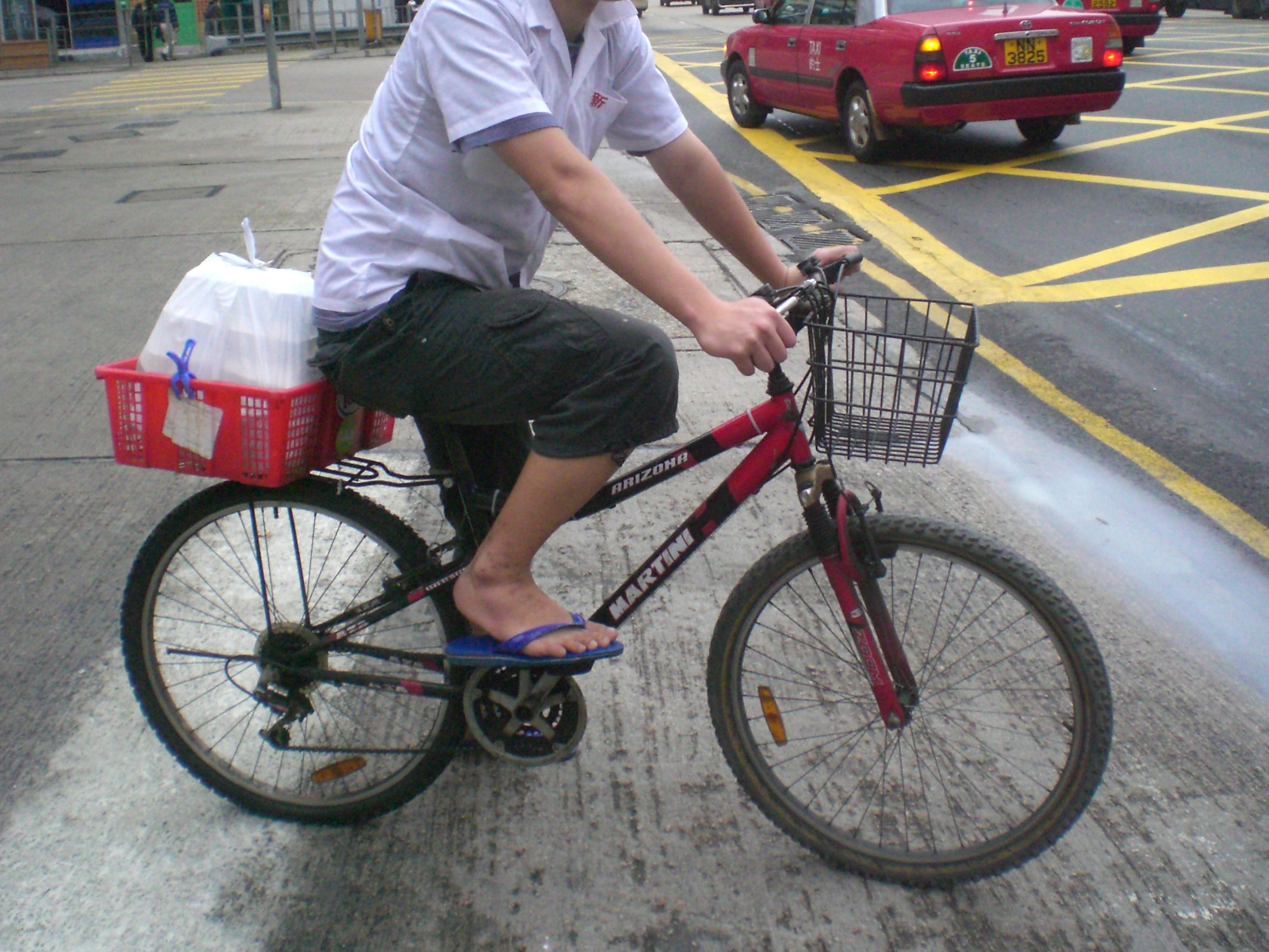 三個骨褲zh:人字拖zh:單車zh:送外賣